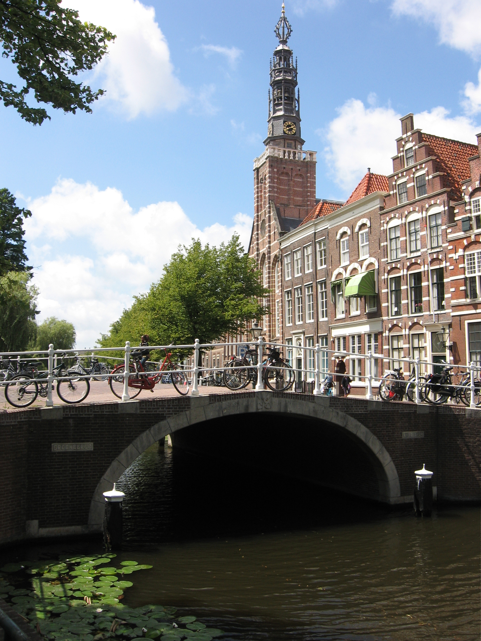 Groenebrug Leiden.jpg